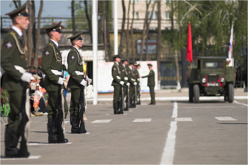 Курсанты Тольяттинского военно-технического института на параде в честь Дня Победы, Тольятти, Россия